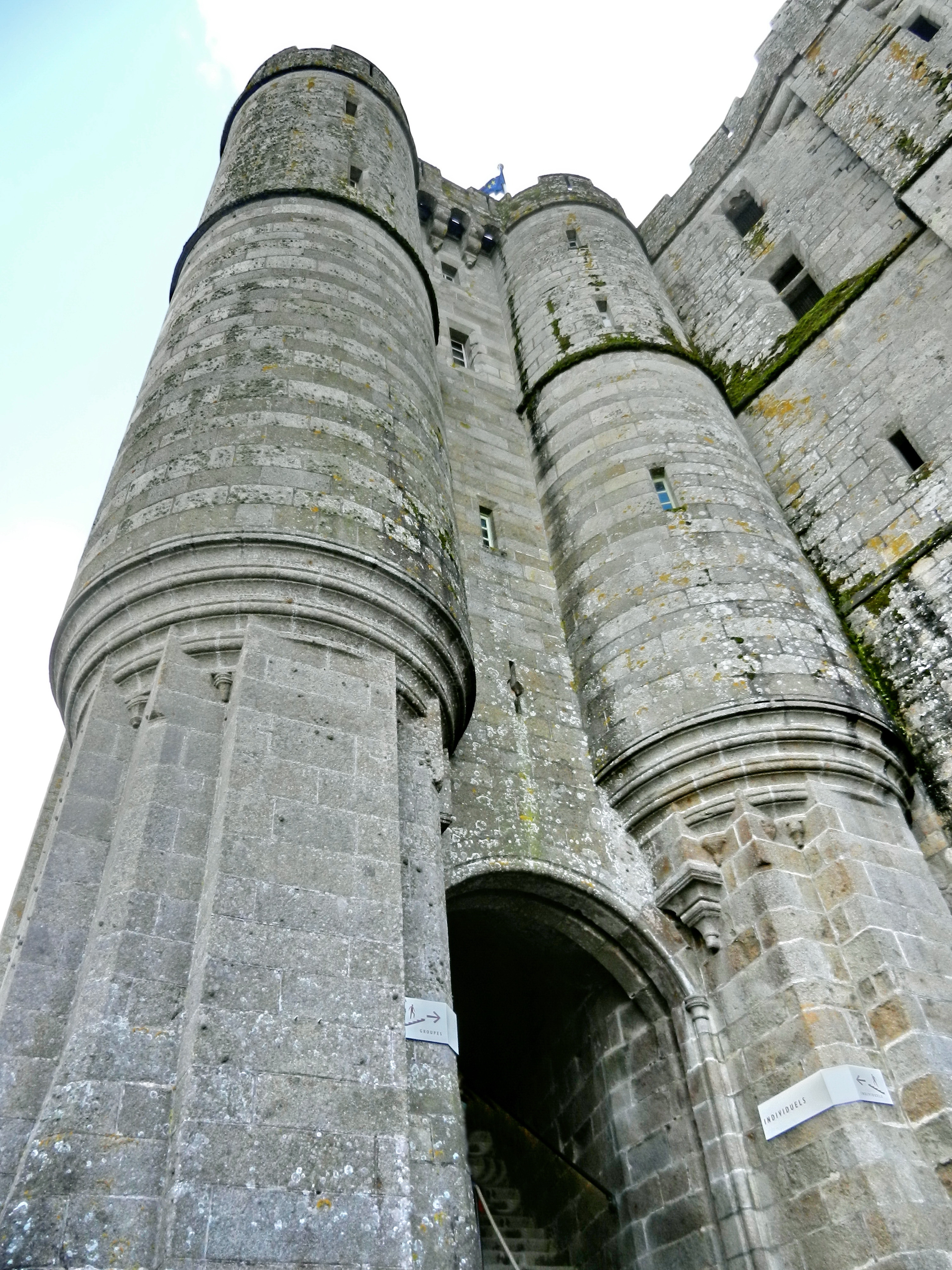 Ле Мон-Сен-Мишель